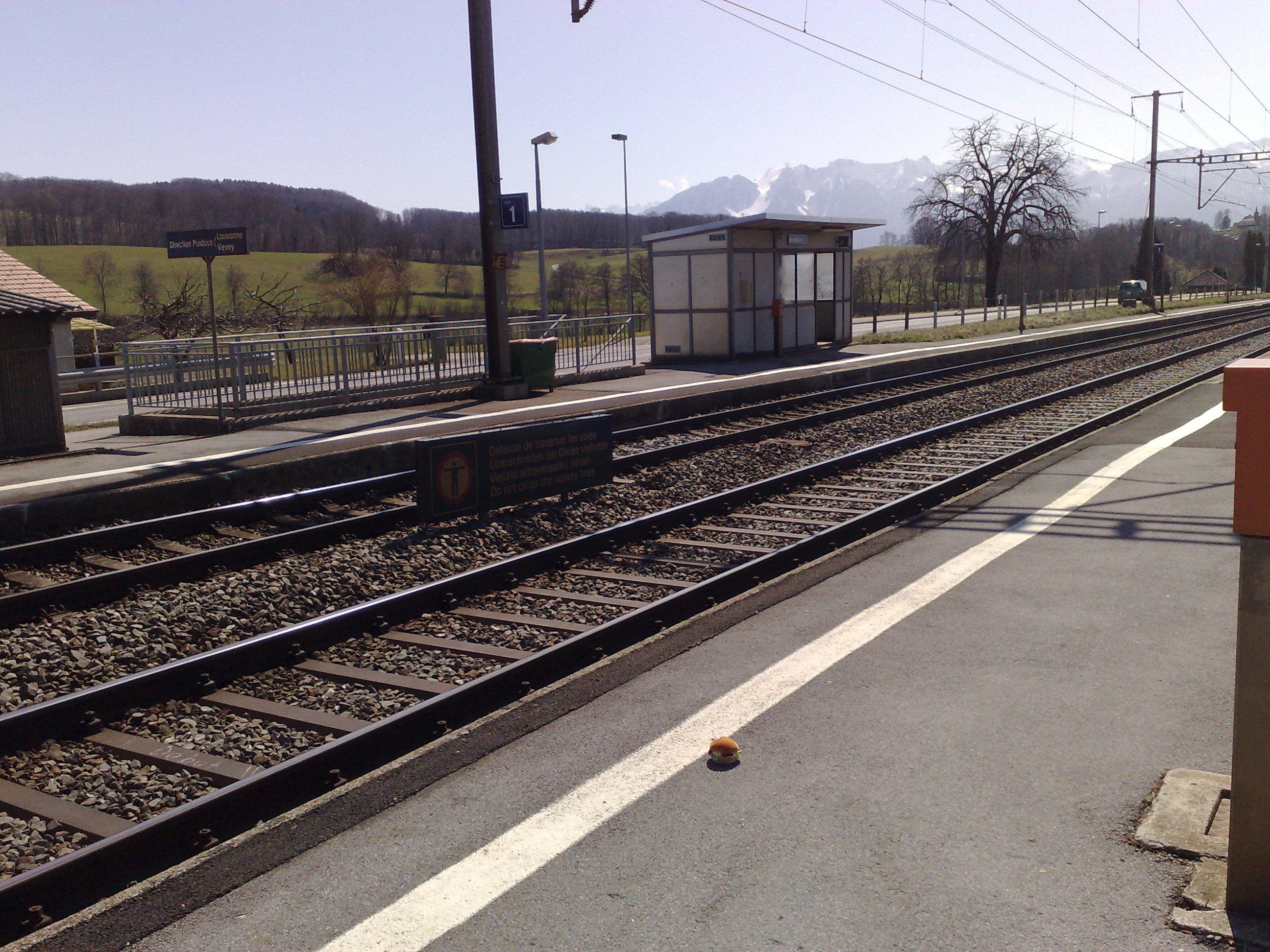 Gare de Moreillon